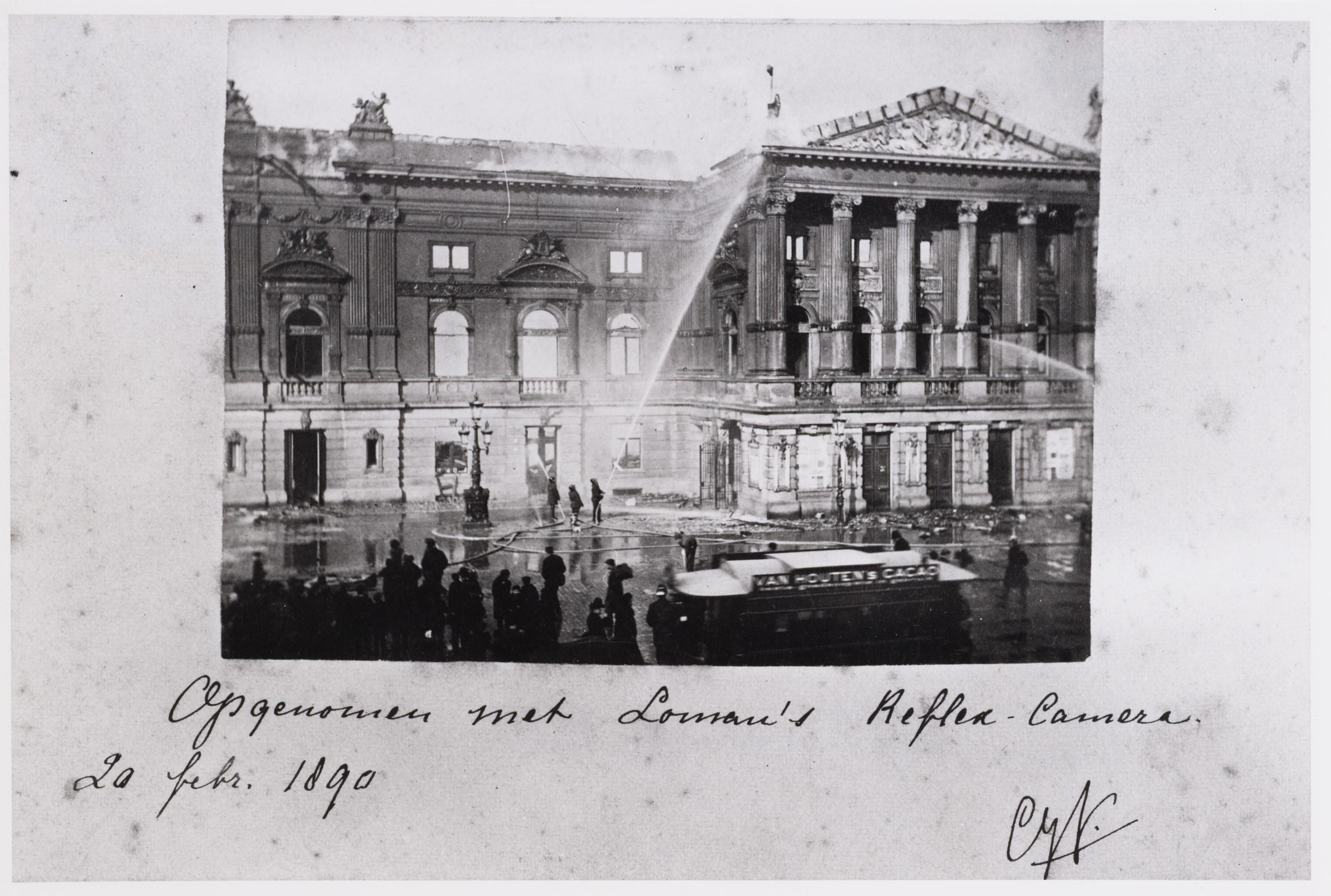 Beschrijving Brand van de Stadsschouwburg, Leidseplein 26 Reproductie naar een opname met Loman's Reflex Camera. Documenttype foto Vervaardiger Onbekend Anoniem Collectie Collectie Stadsarchief Amsterdam: foto-afdrukken Datering 20 februari 1890 Geografische naam Leidseplein Gebouw Stadsschouwburg Inventarissen Afbeeldingsbestand OSIM00008003384